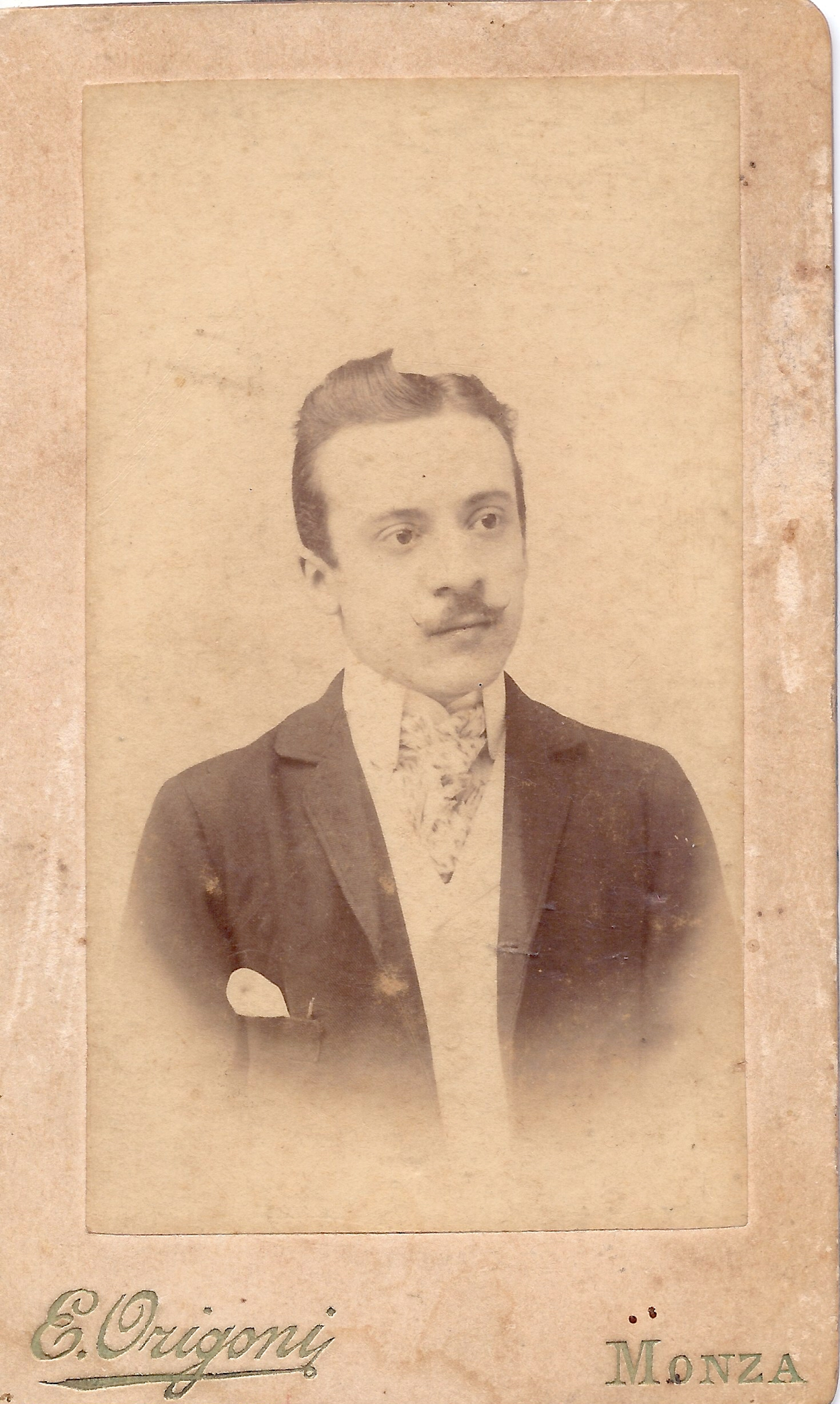 Foto di famiglia